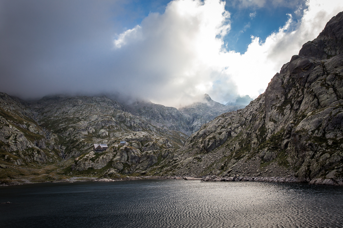 Refuge de Nice dans son élément.